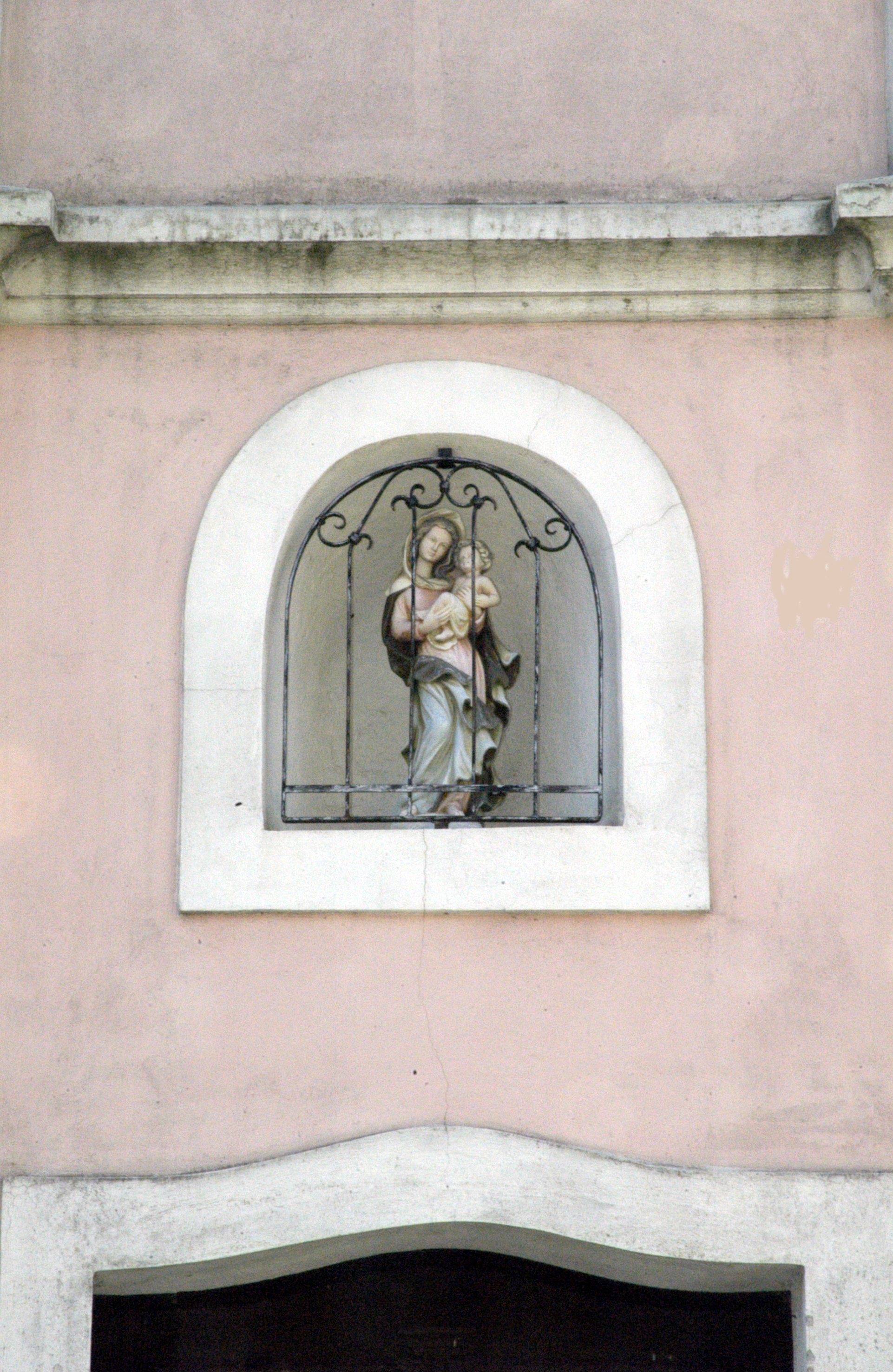 Ortskapelle in Reikersdorf, Gemeinde Maissau - Figurennische über dem Portal